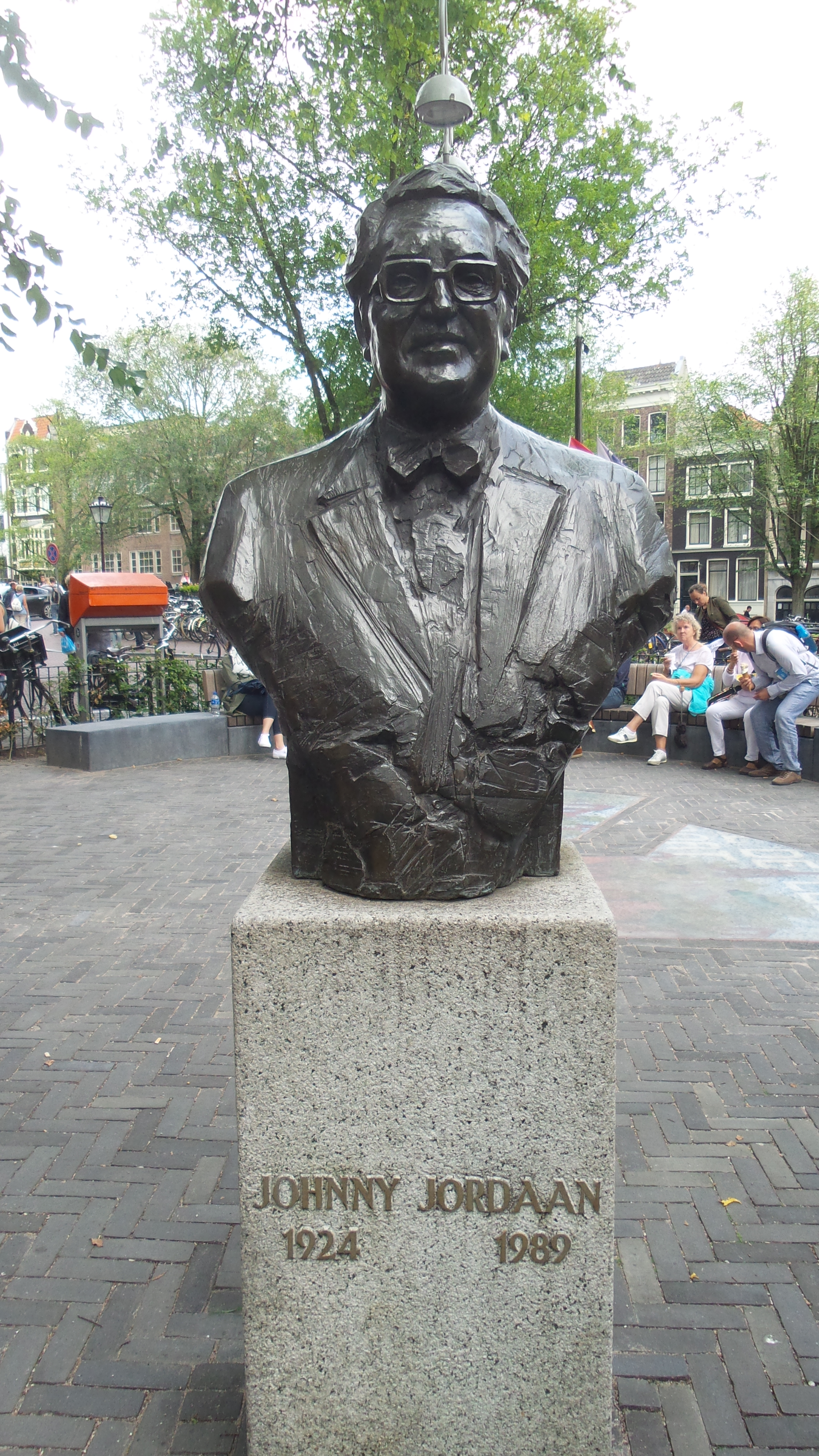 Beeld van Johnny Jordaan (Johannes van Musscher) gemaakt door beeldhouwer Kees Verkade in 1991, geplaatst op het Johnny Jordaanplein, Amsterdam